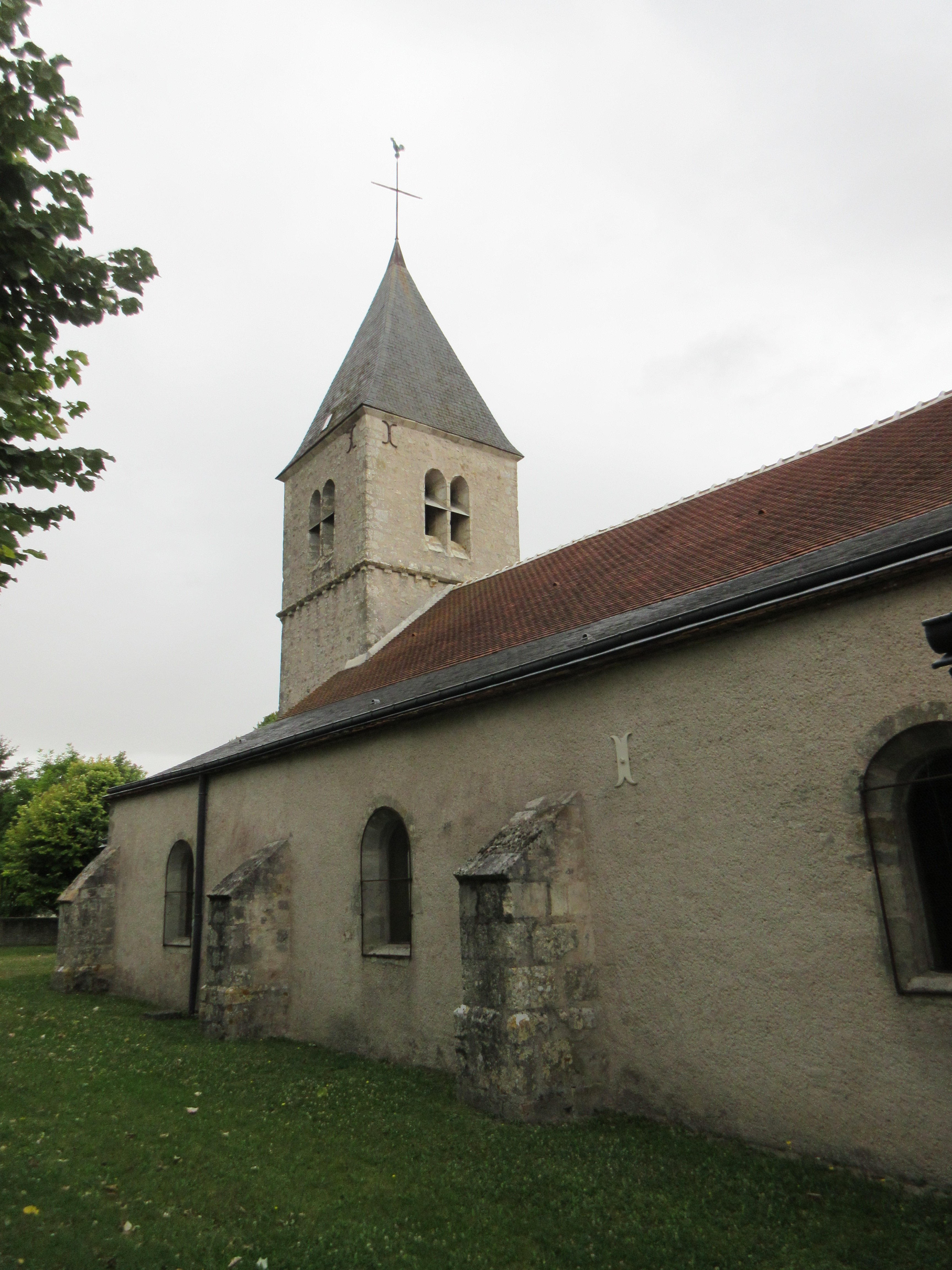 Église Saint-Germain, Santeau, Loiret, France